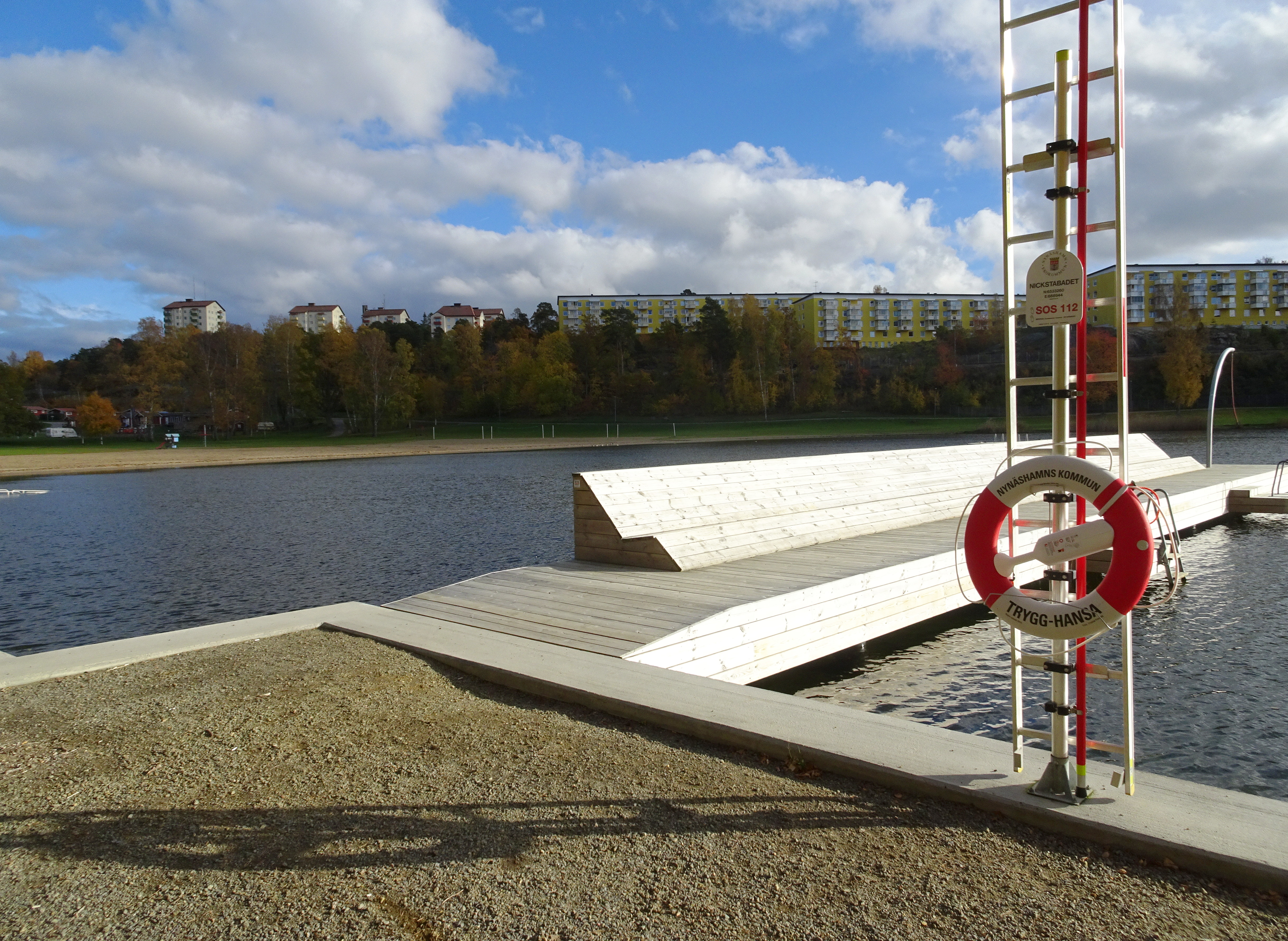 Nickstabadet i Nynäsviken, Nynäshamn